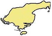 Oversigt over Læsø